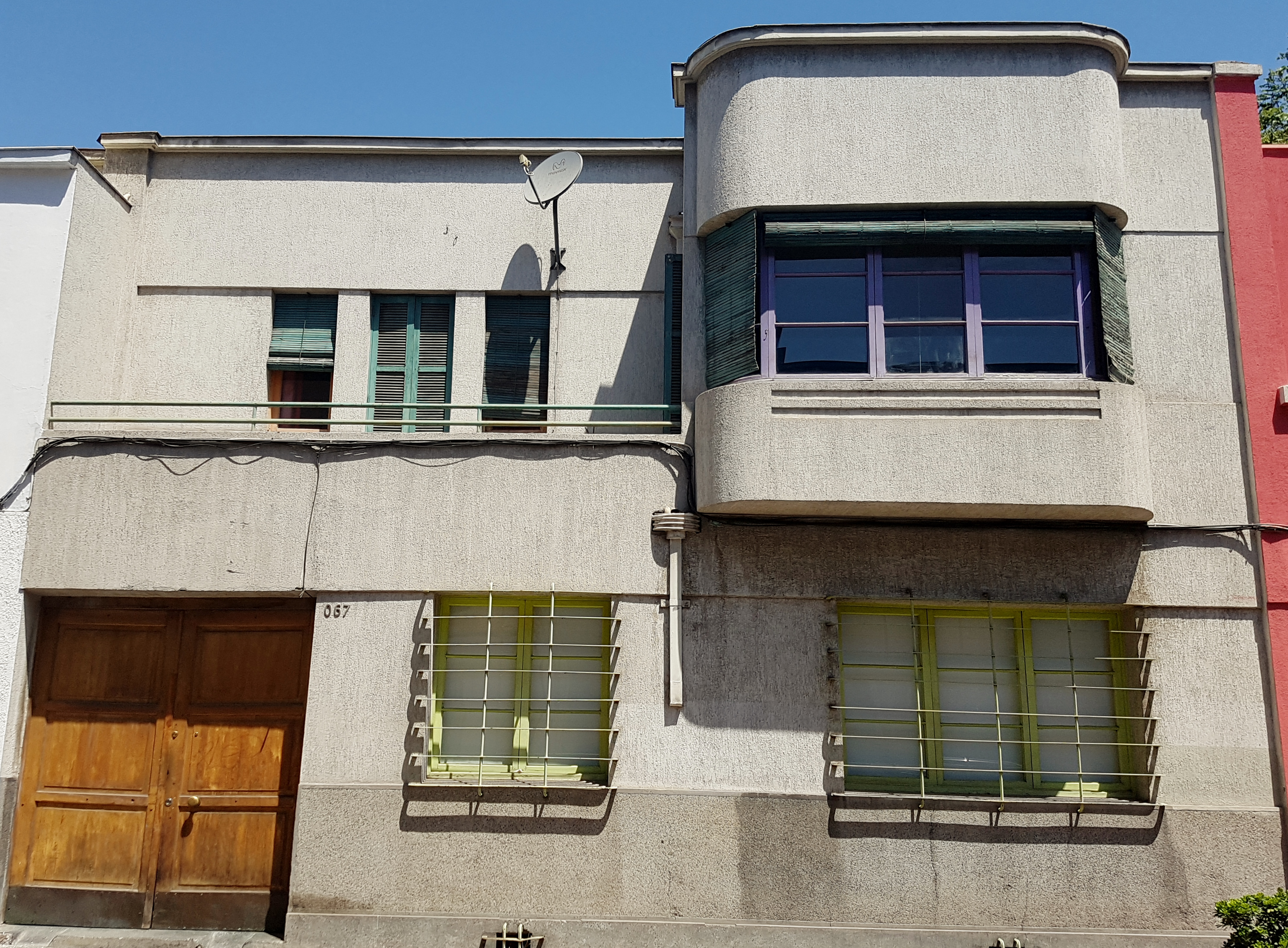 Sede de la Fundación Víctor Jara, calle Almirante Riveros 067, entre las avenidas Bustamante y Vicuña Mackenna; comuna de Providencia, Santiago de Chile.